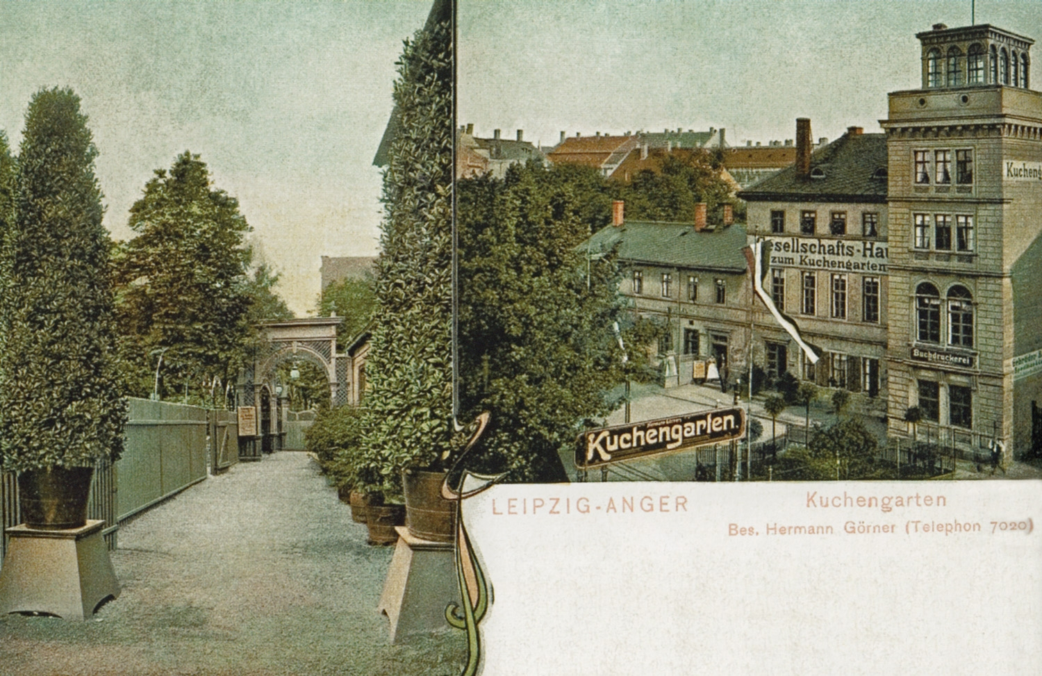 Das Gartenrestaurant Kleiner Kuchengarten in Leipzig, um 1908